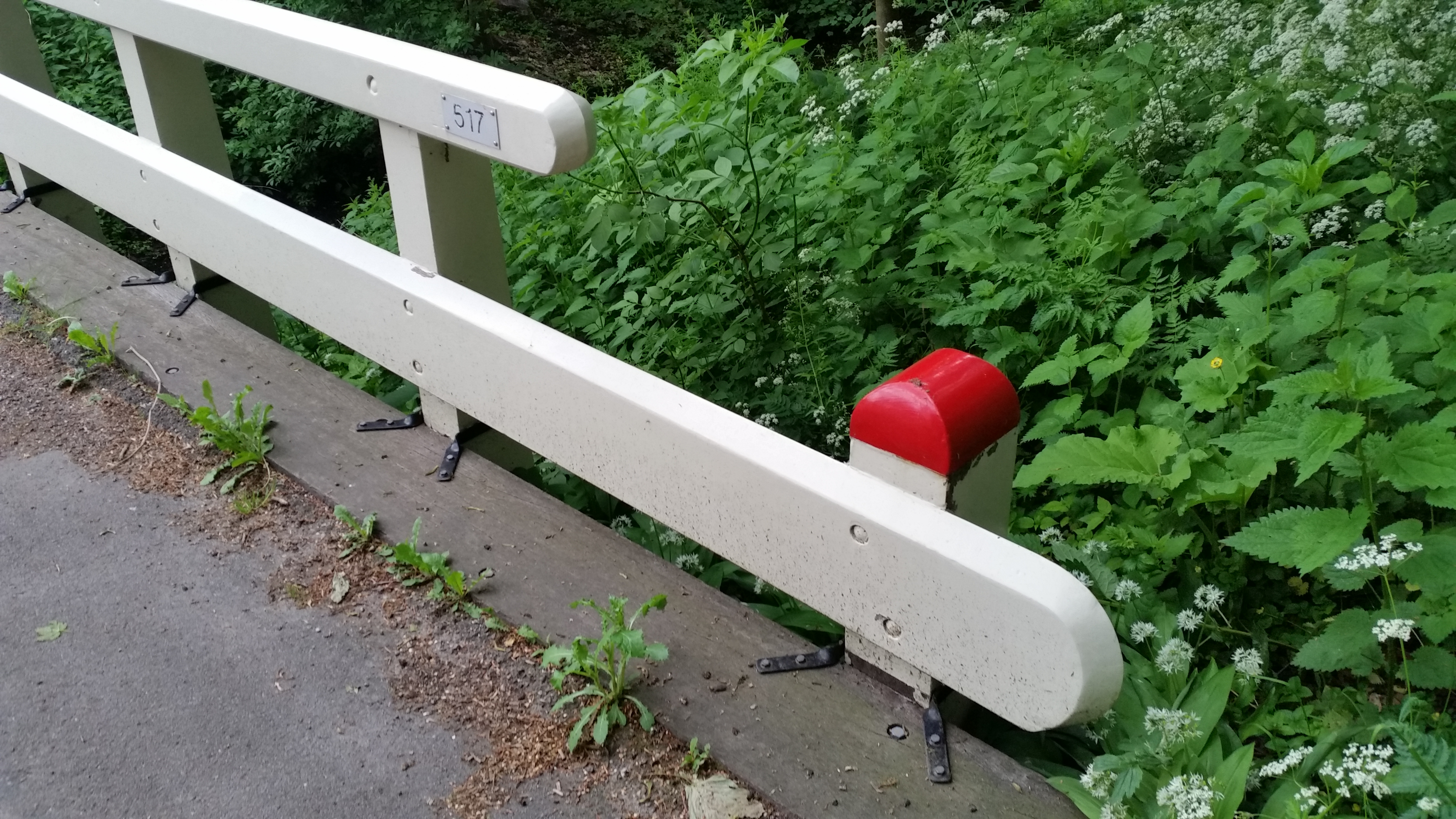 Leuningen van Brug 517 (in Amsterdam)